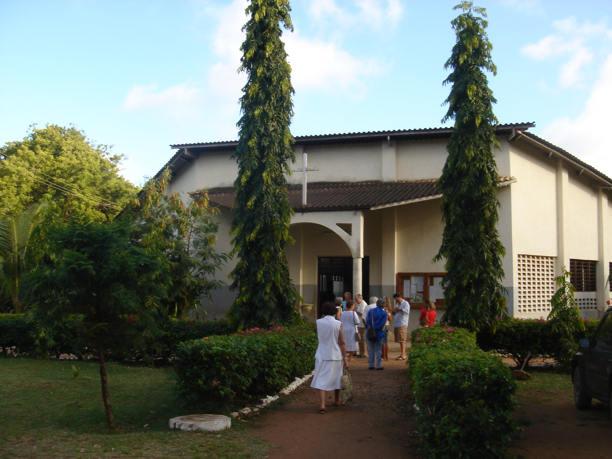 Cattedrale di s.Antonio a Malindi